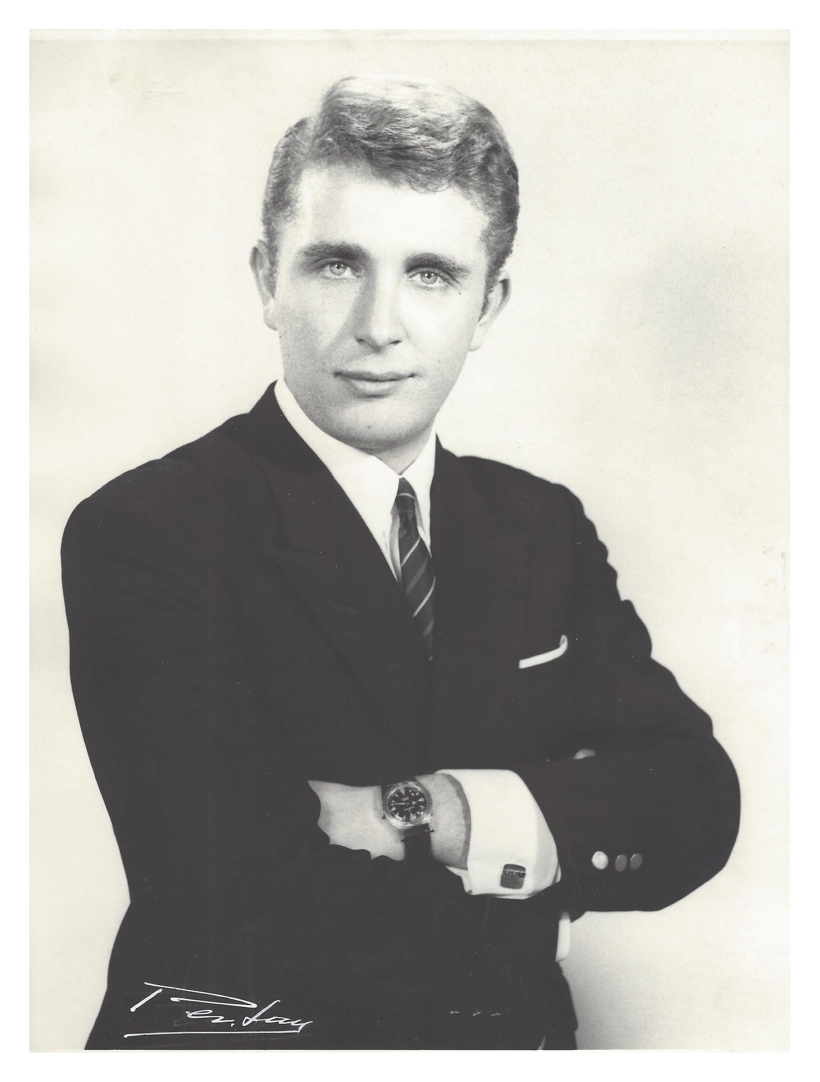 Jaime Juventud